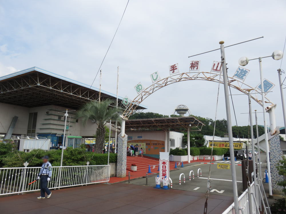 兵庫県姫路市にある「ひめじ手柄山遊園」の出入口。